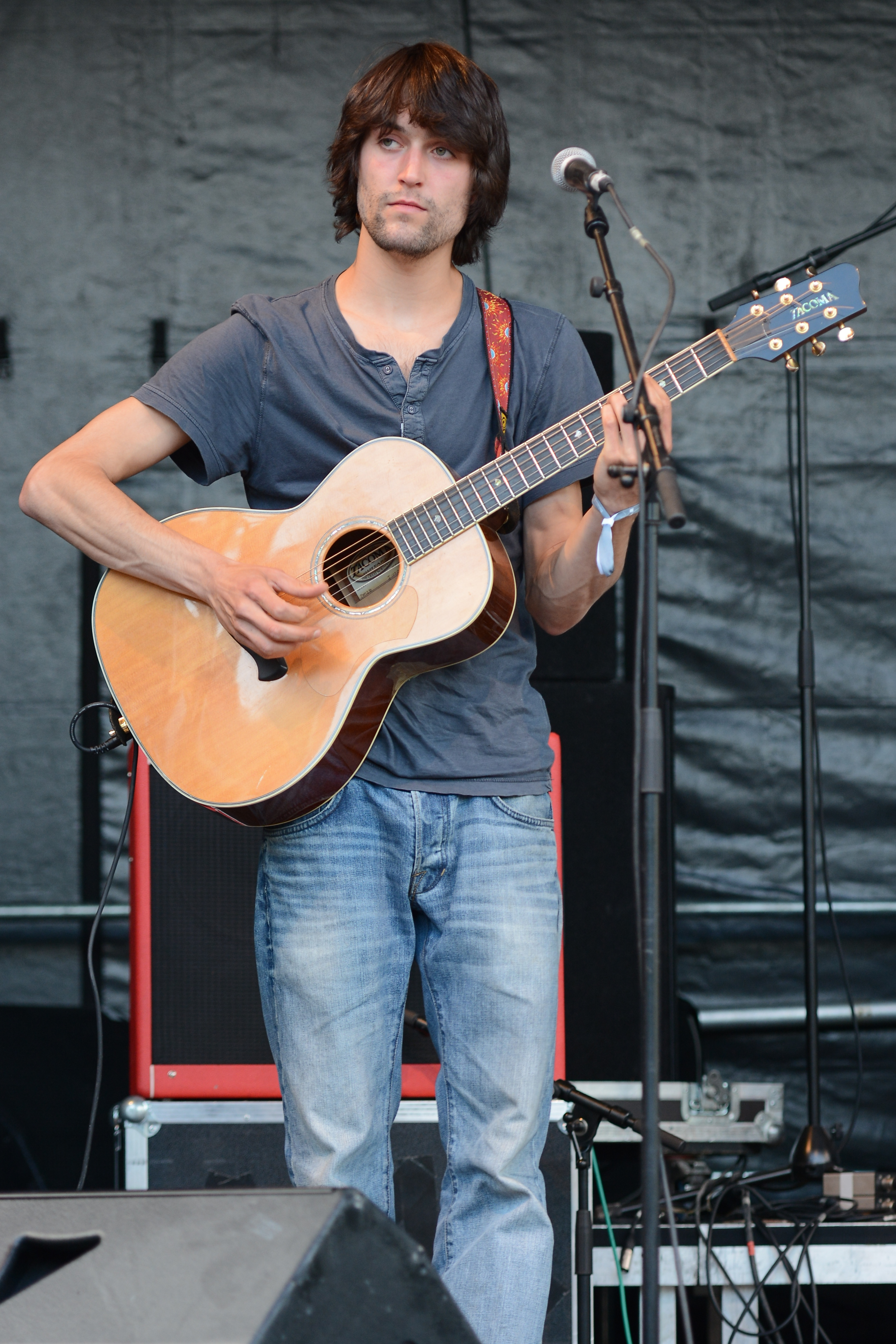 AnnenMayKantereit beim Traumzeit-Festival 2014